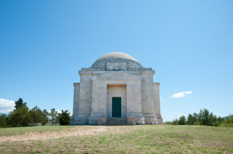 Ivan Meštrović Crkve Presvetog Otkupitelja, selo Ružić